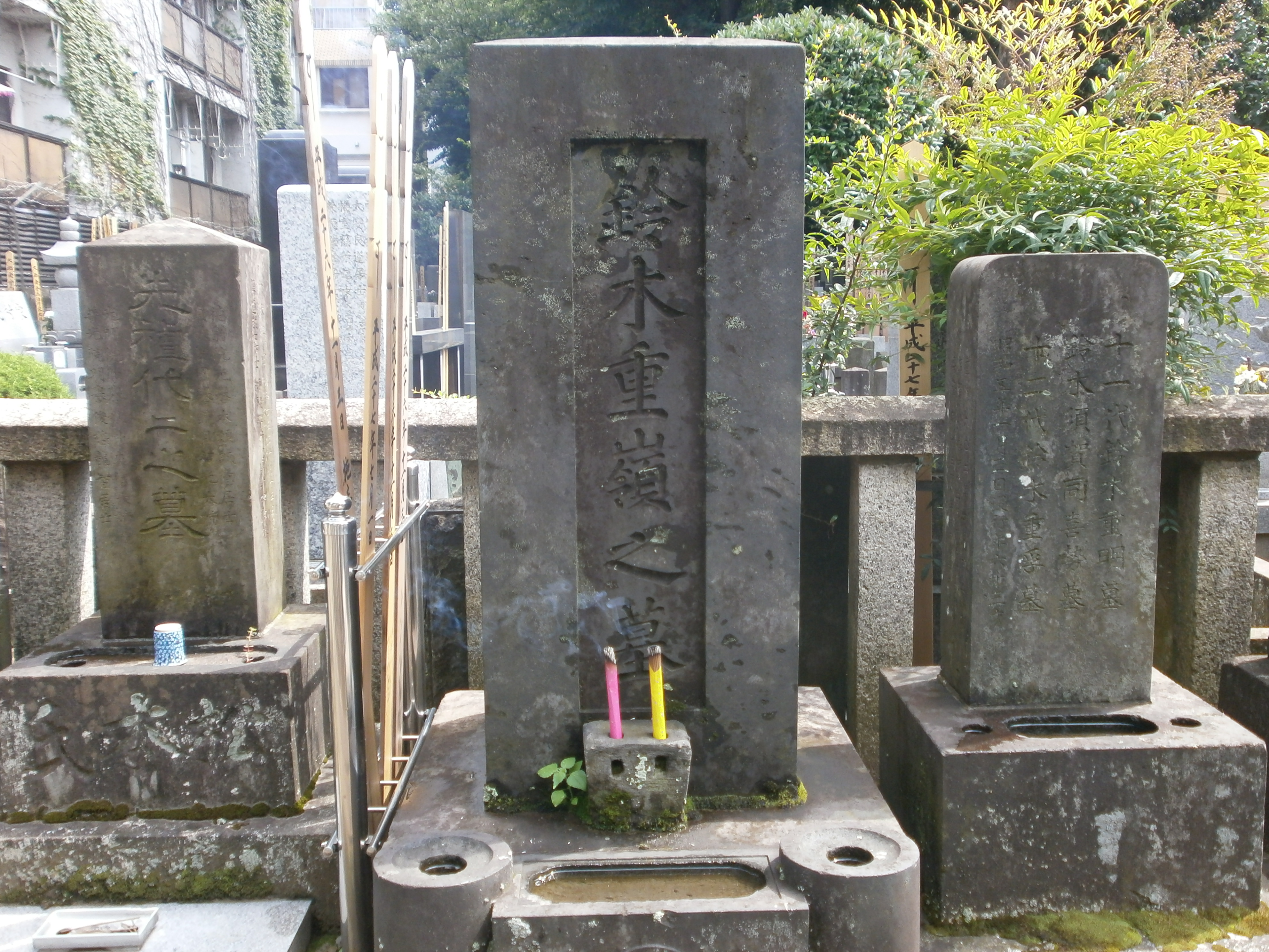 鈴木重嶺・翠園墓